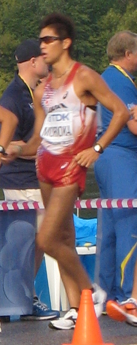 Чемпионат мира по лёгкой атлетике 2013. Ходьба 50 км, мужчины. Пелотон